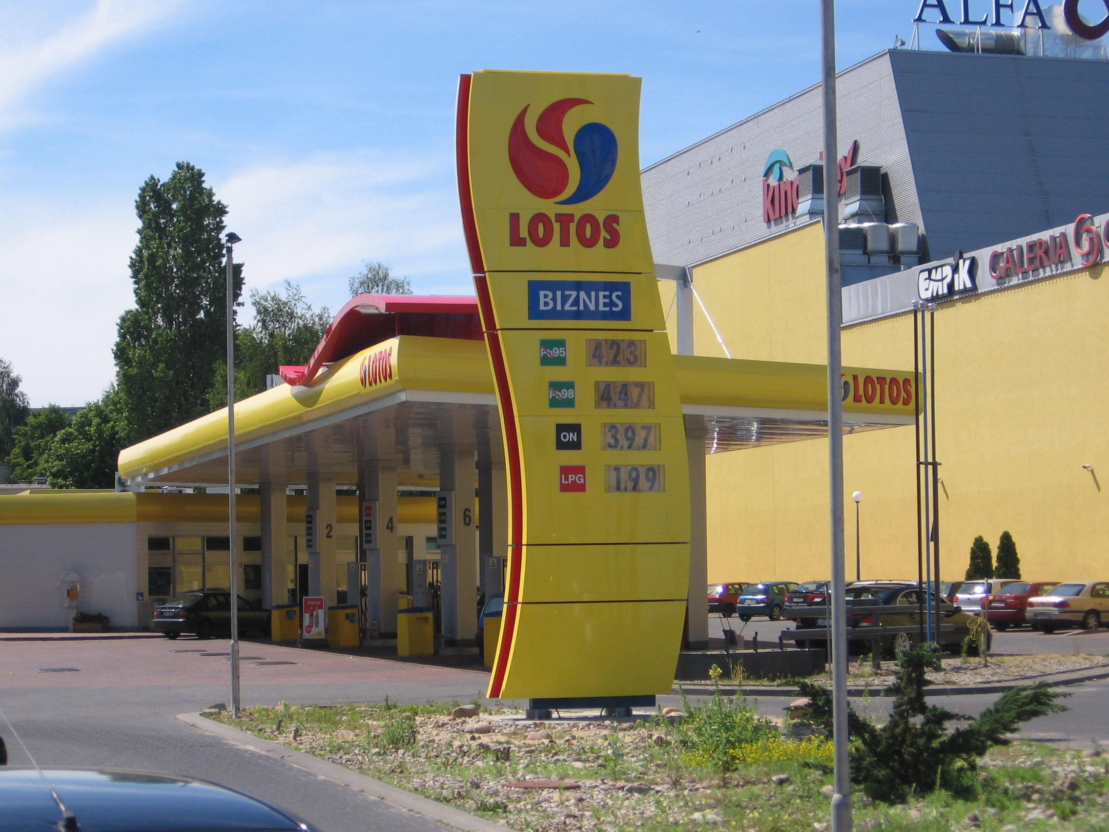 Lotos gas station, Gdansk, Poland.